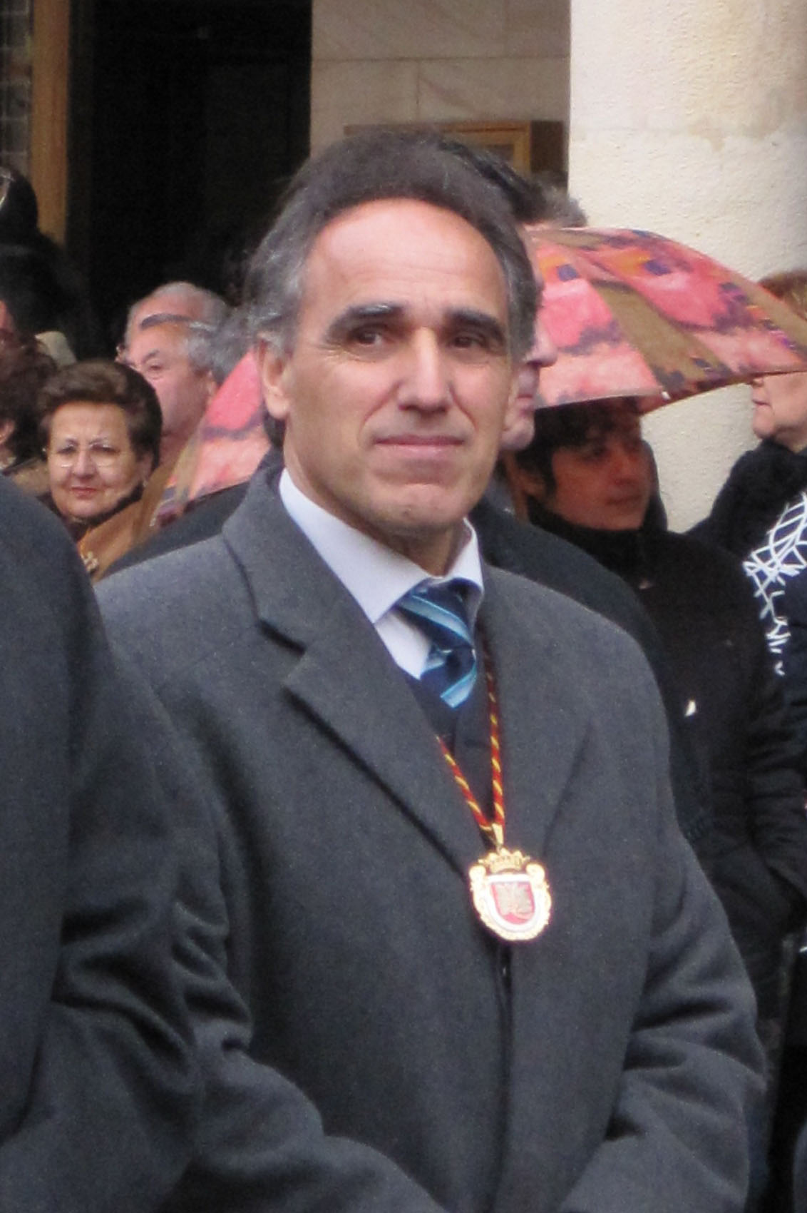 Imagen del ex-alcalde de Astorga (León, España), Juan José Alonso Perandones.